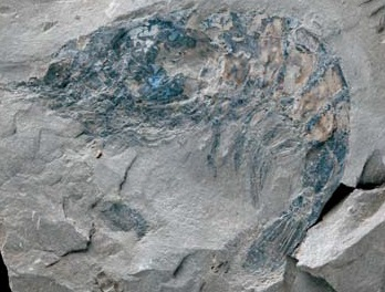 Phosphatised and pyritised compression of shrimp (Archeosolenocera straeleni, MNHN R61847), lateral view.